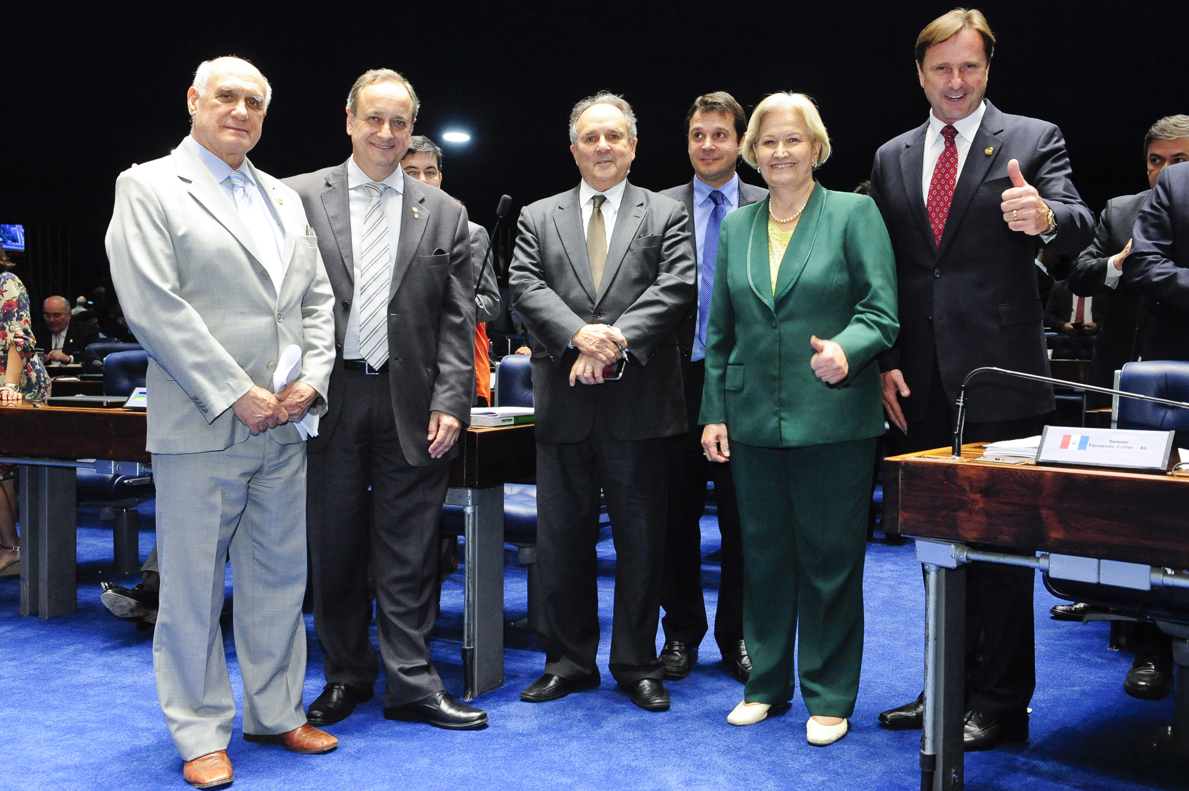 Plenário do Senado Federal durante sessão deliberativa ordinária. Senadores e o secretário estadual de educação do Rio Grande do Sul, ex-deputado Vieira da Cunha, posam para foto. Foto: Waldemir Barreto/Agência Senado